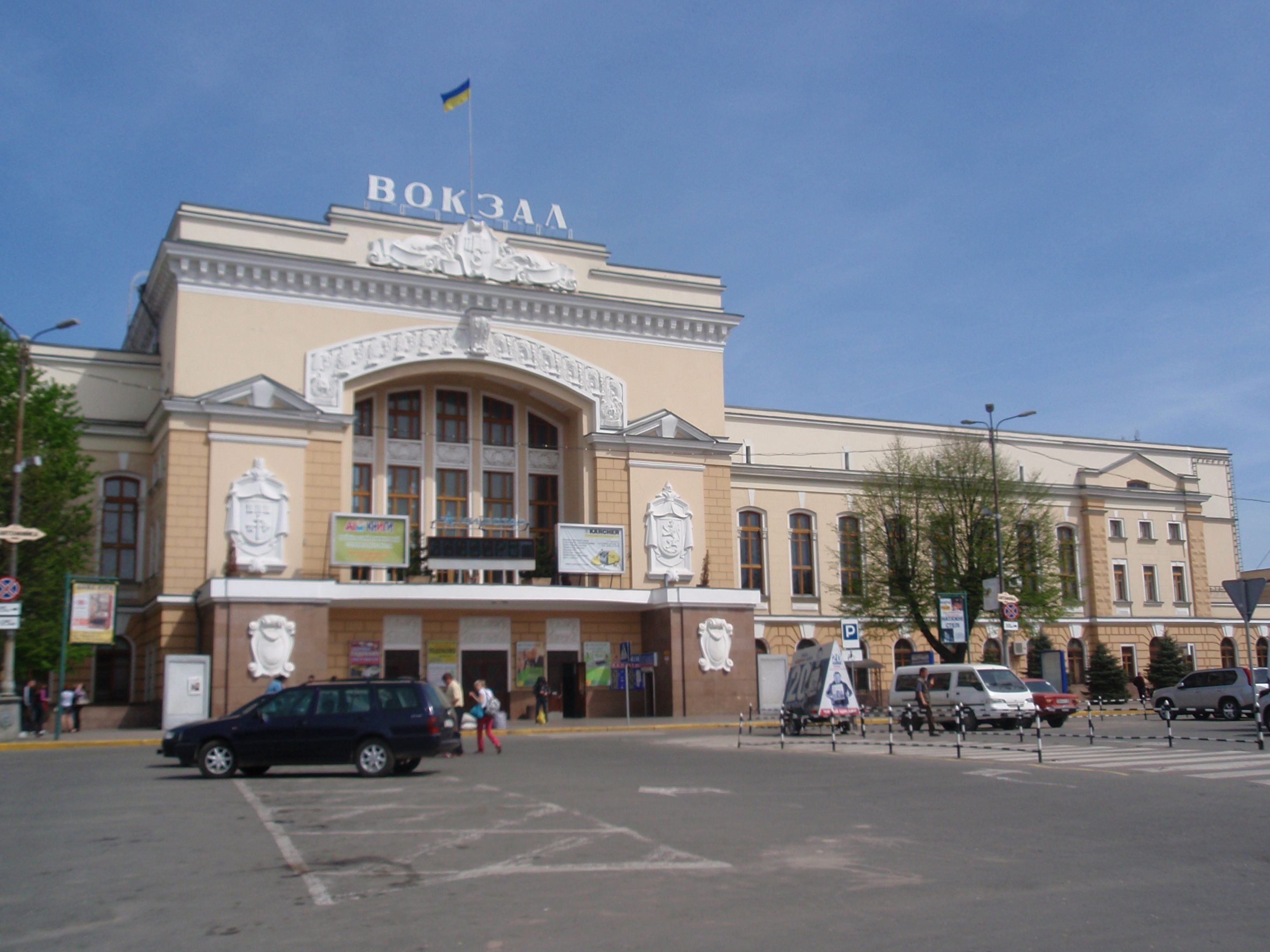 Вокзал ст. Тернопіль (мур.), Тернопіль, Майдан Привокзальний